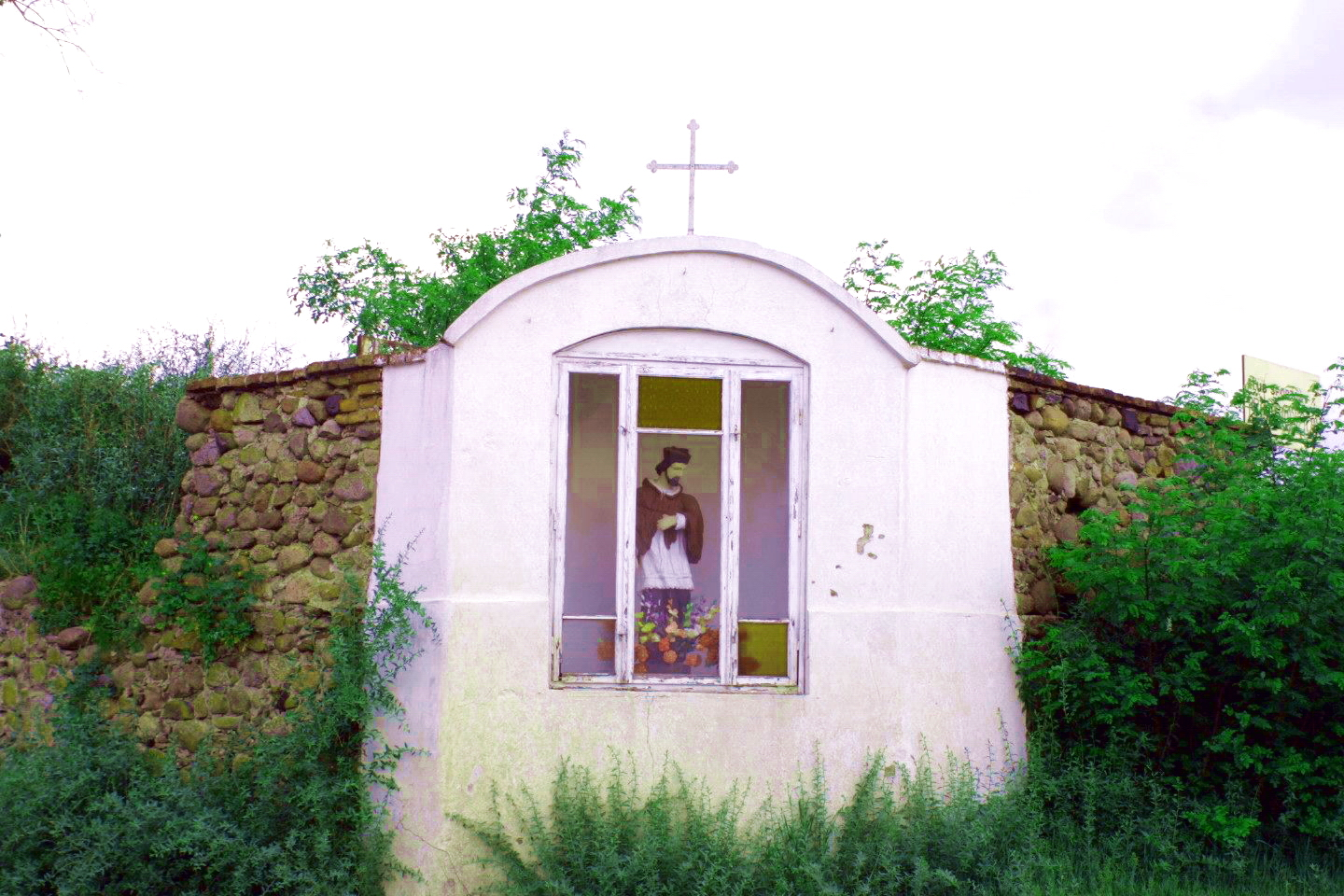 Kosów Lacki. Kapliczka przydrożna z XVIII w. z rzeźbą św. Jana Nepomucena.